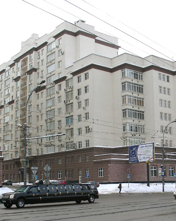 Preobrazhenskaya Zastava apartments, Moscow